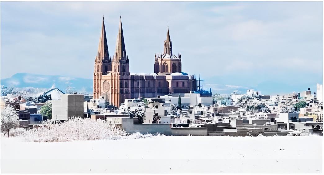 De Izquierda a Derecha la Ciudad De Arandas En La Nevada Del 10-3-2016